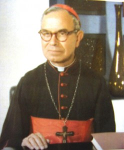 Cardenal José Salazar López